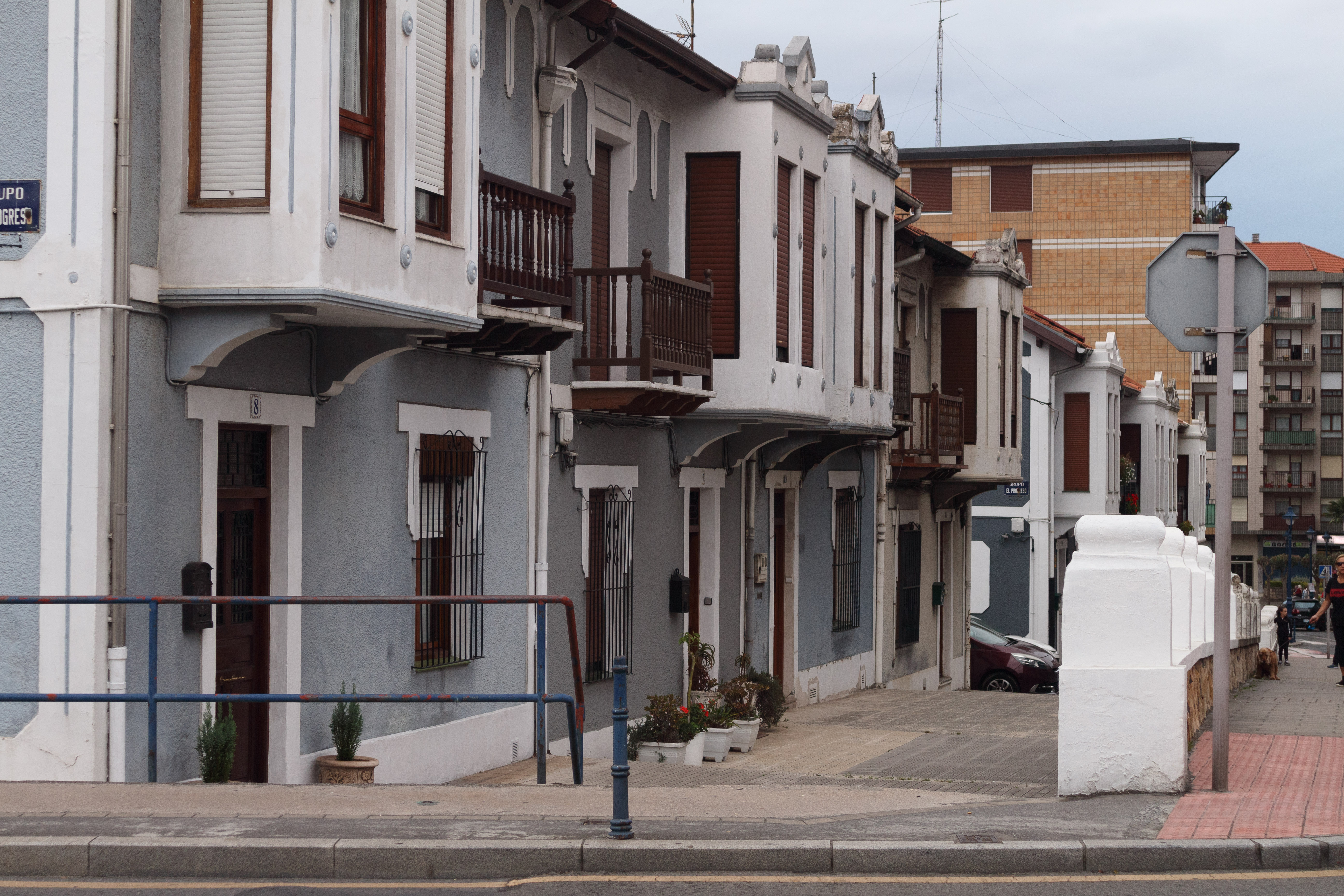 El Progreso etxebizitza merkeen sozietate kooperatiboa